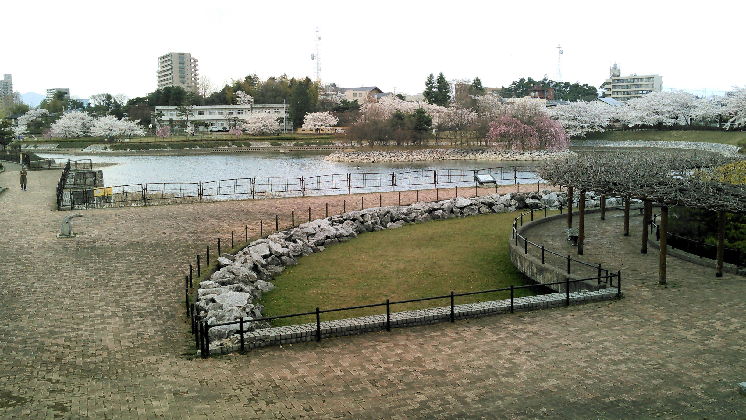 荒池公園の池と桜